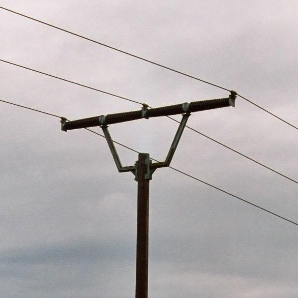 Isoliertraverse einer einkreisigen 110-kV-Freileitung in Göppingen